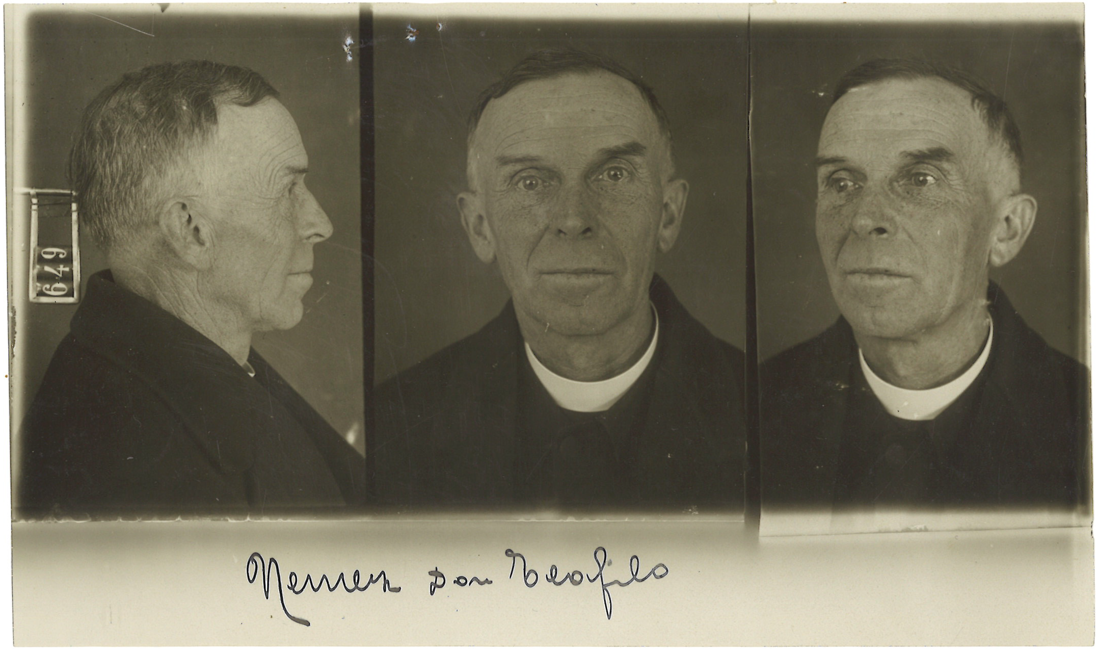 Výslech Bohumila Němce 1931